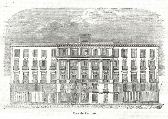 Casa Cordero, en la revista española La Ilustración.